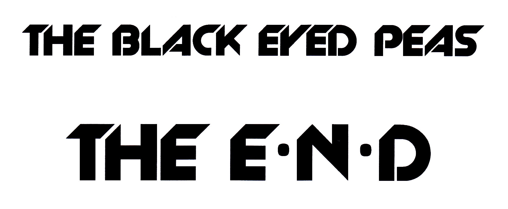 the e.n.d. logo